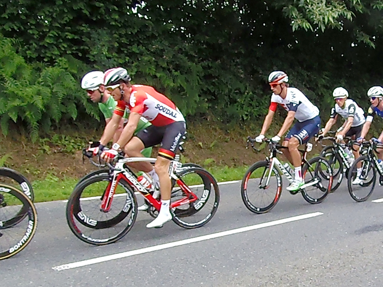 3e étape du Tour de France 2016, au Grand-Celland (km 44, Normandie, France). Mark Cavendish, Adam Hansen et Reto Hollenstein, dans le peloton.